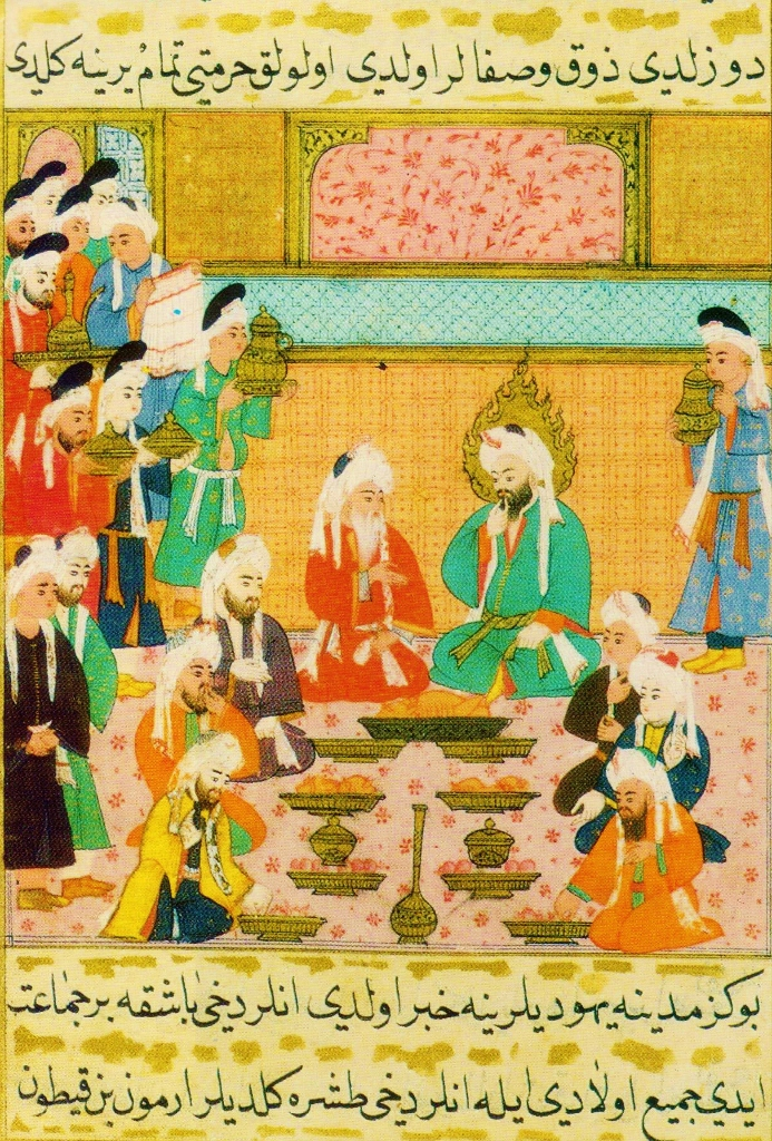 Beginnt Mohammed – er ist mittlerweile mit einer reichen Witwe verheiratet – seinen Glauben zu lehren und Anhänger um sich zu scharen